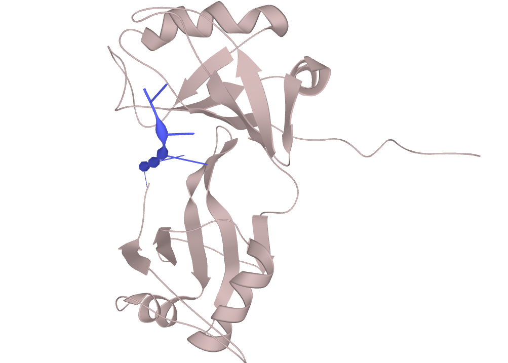 Estructura quaternària CPEB4 3